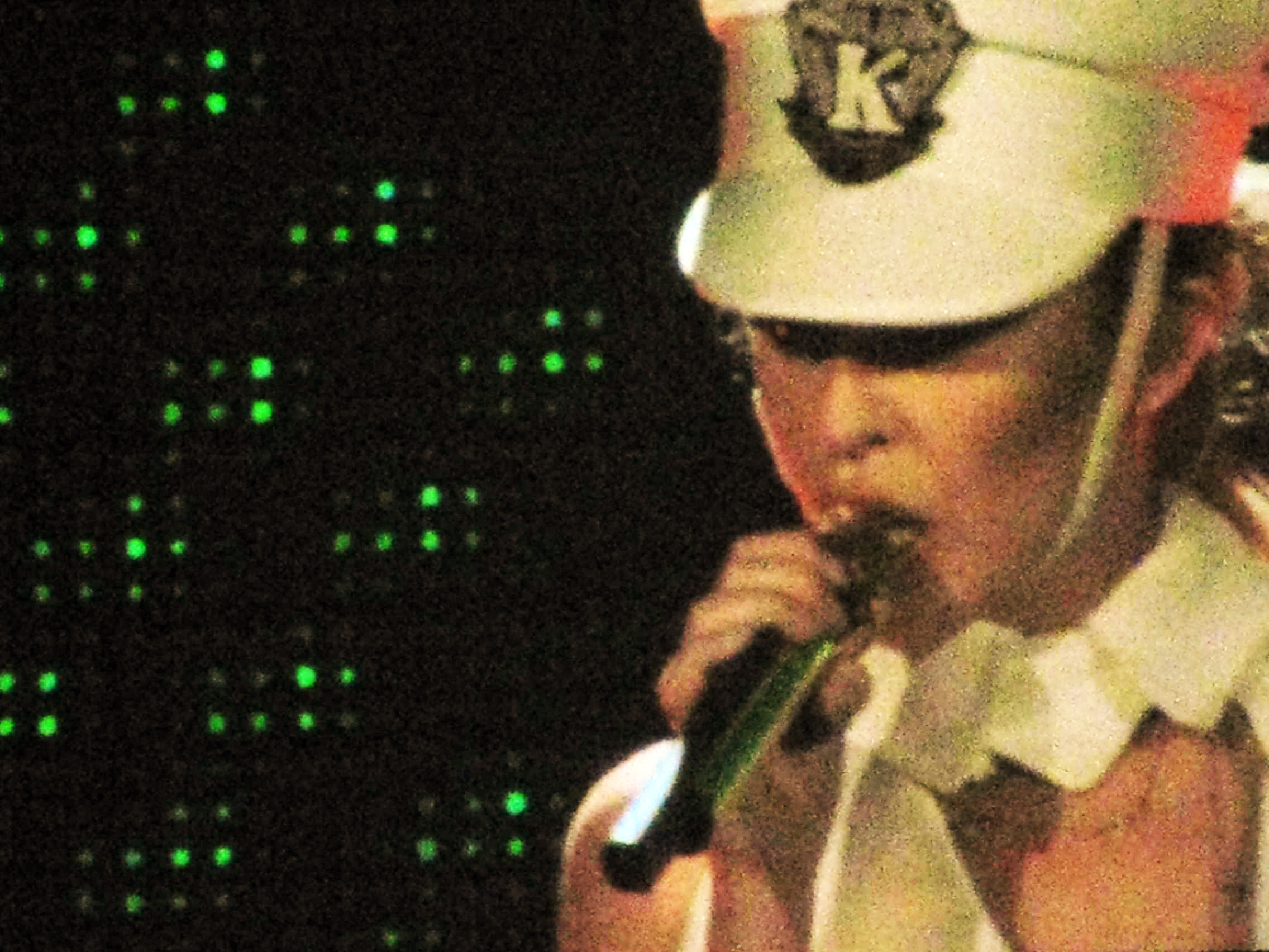 Kylie Minogue interpretando "Like A Drug" en su gira norteamericana "For You, For Me Tour 2009"